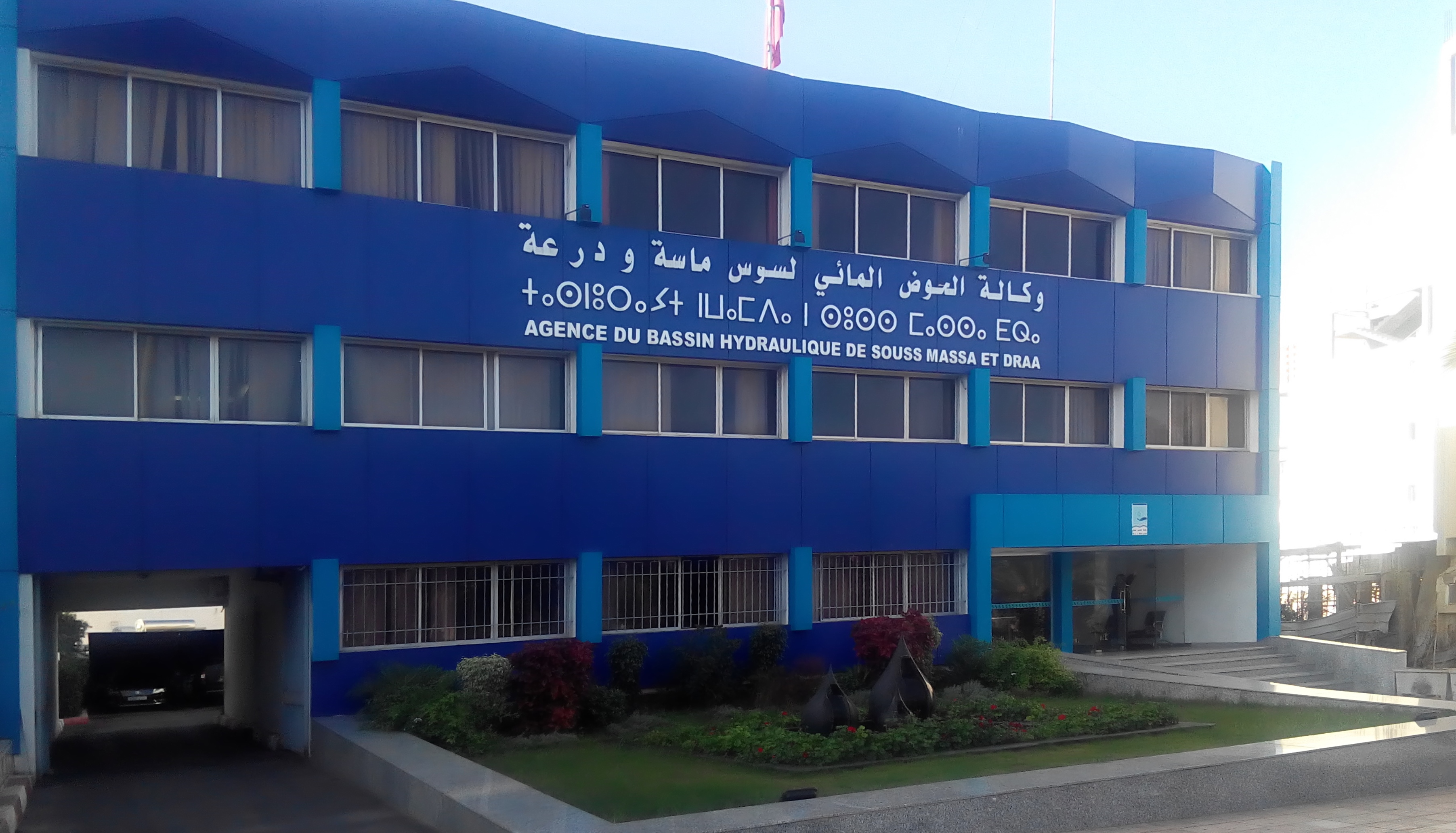 C(2017), Verwaltungsgebäude